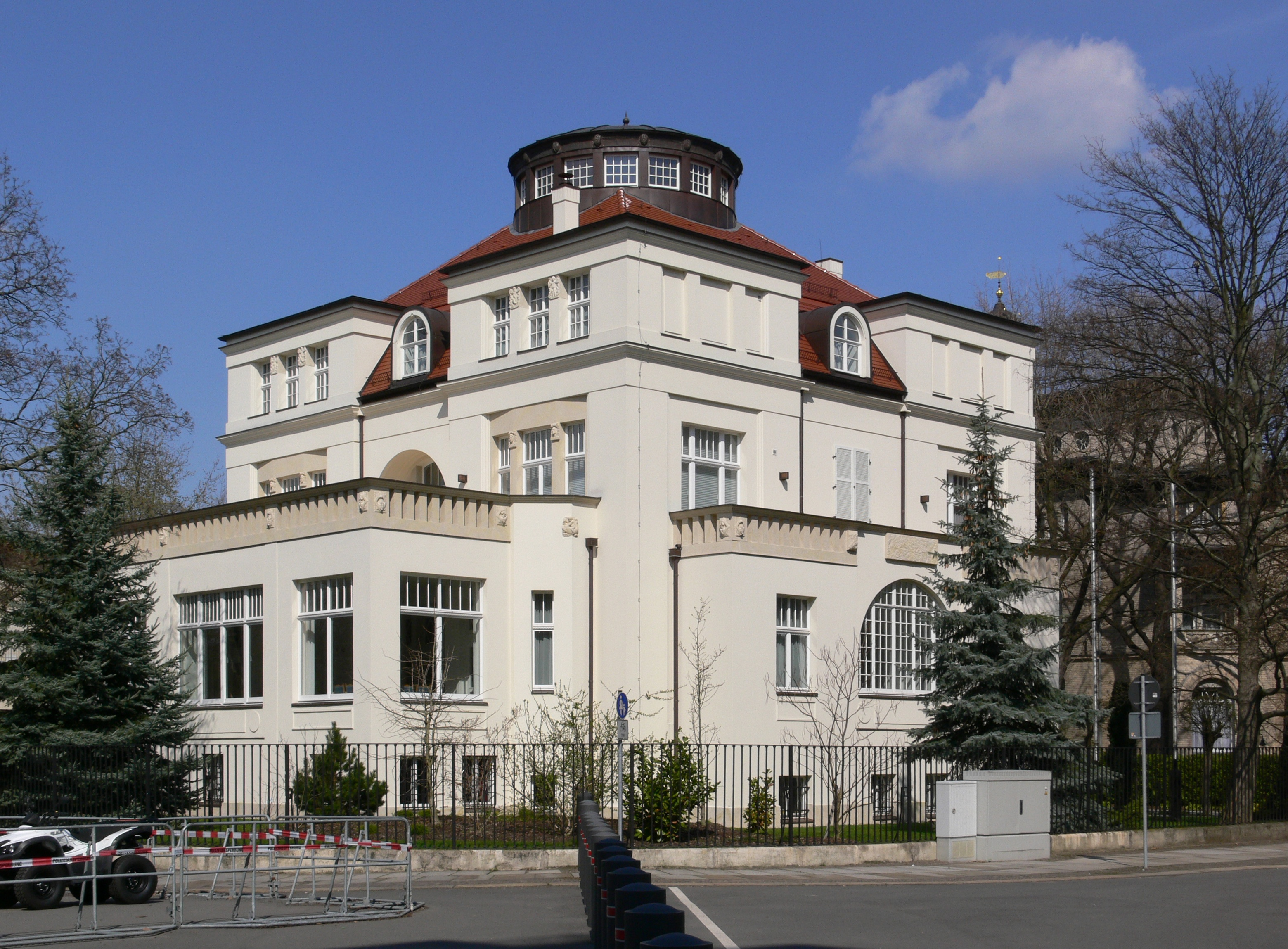 Vila Ury in Leipzig, Wächterstraße 32; 1909 von Architekt Fritz Drechsler als Villa Seemann erbaut, 2010 als Gästehaus der Stadt Leipzig genutzt